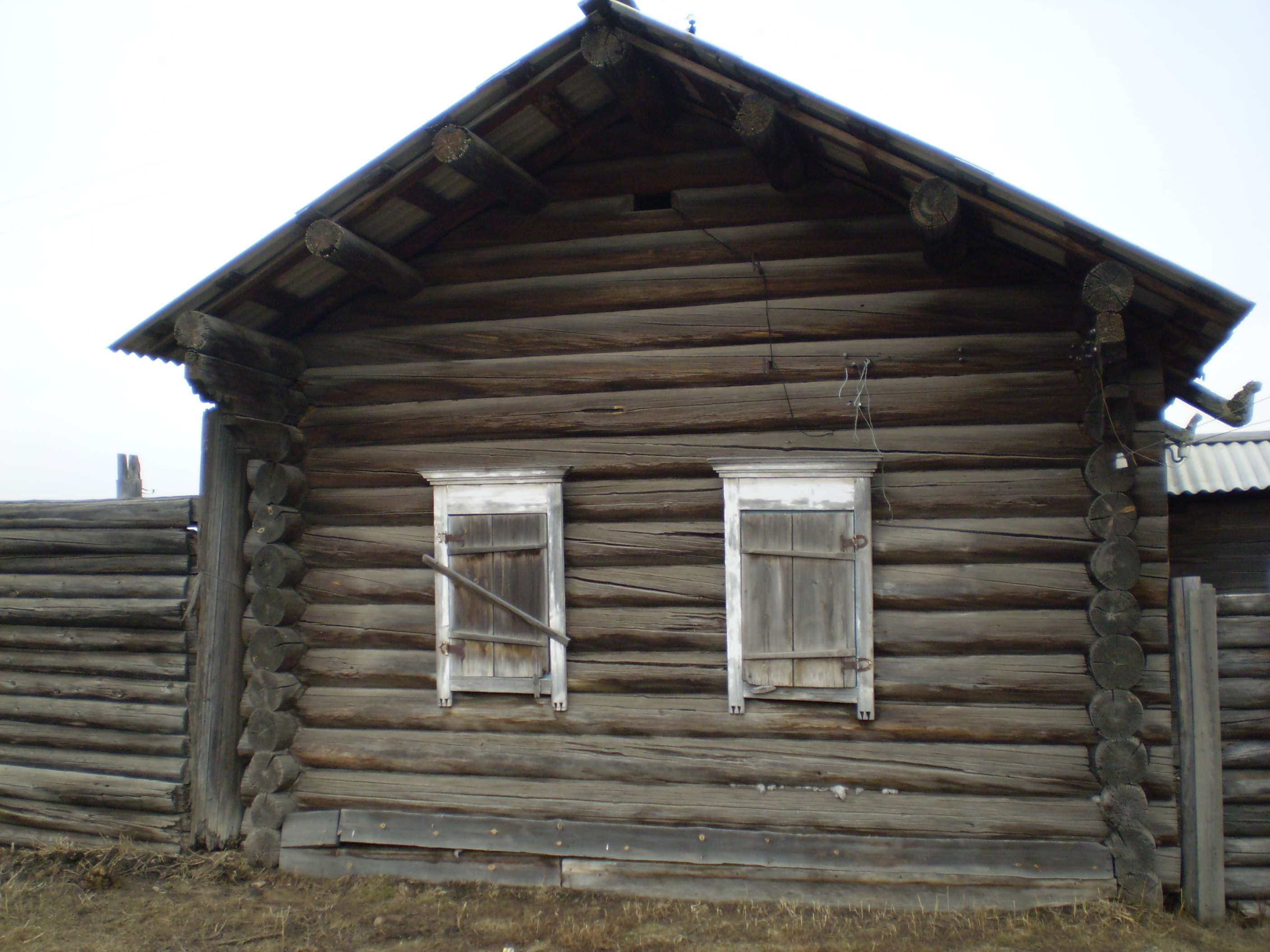 Дом Курдюкова в селе Покровка, Прибайкальский район Бурятии. Памятник архитектуры.